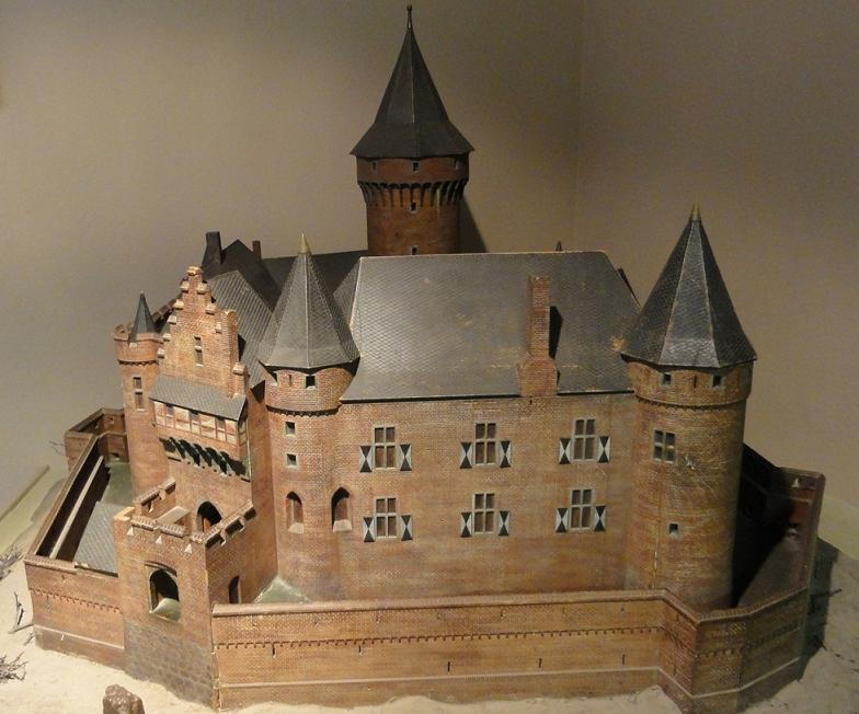 Burg Linn Modell 16. Jh - aus der Modellabteilung Museum Linn